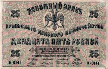 Денежный знак Крымского краевого казначейства 25 рублей 1918 аверс